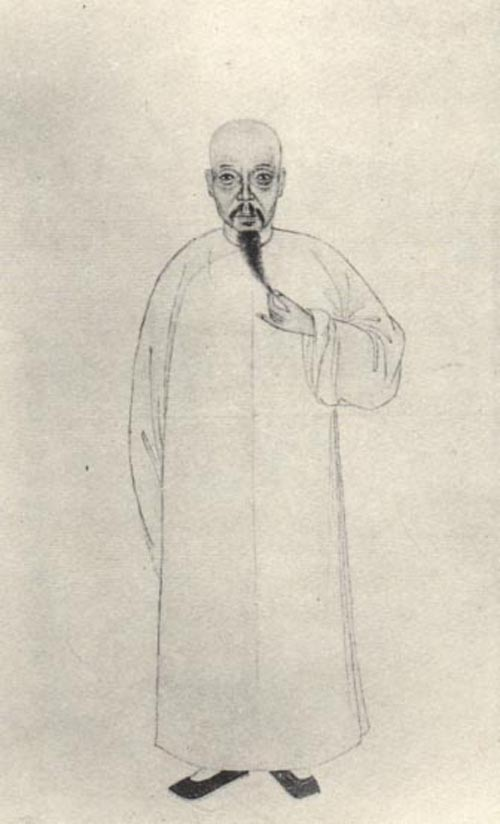 潘德輿，清代學者。Pan Deyu